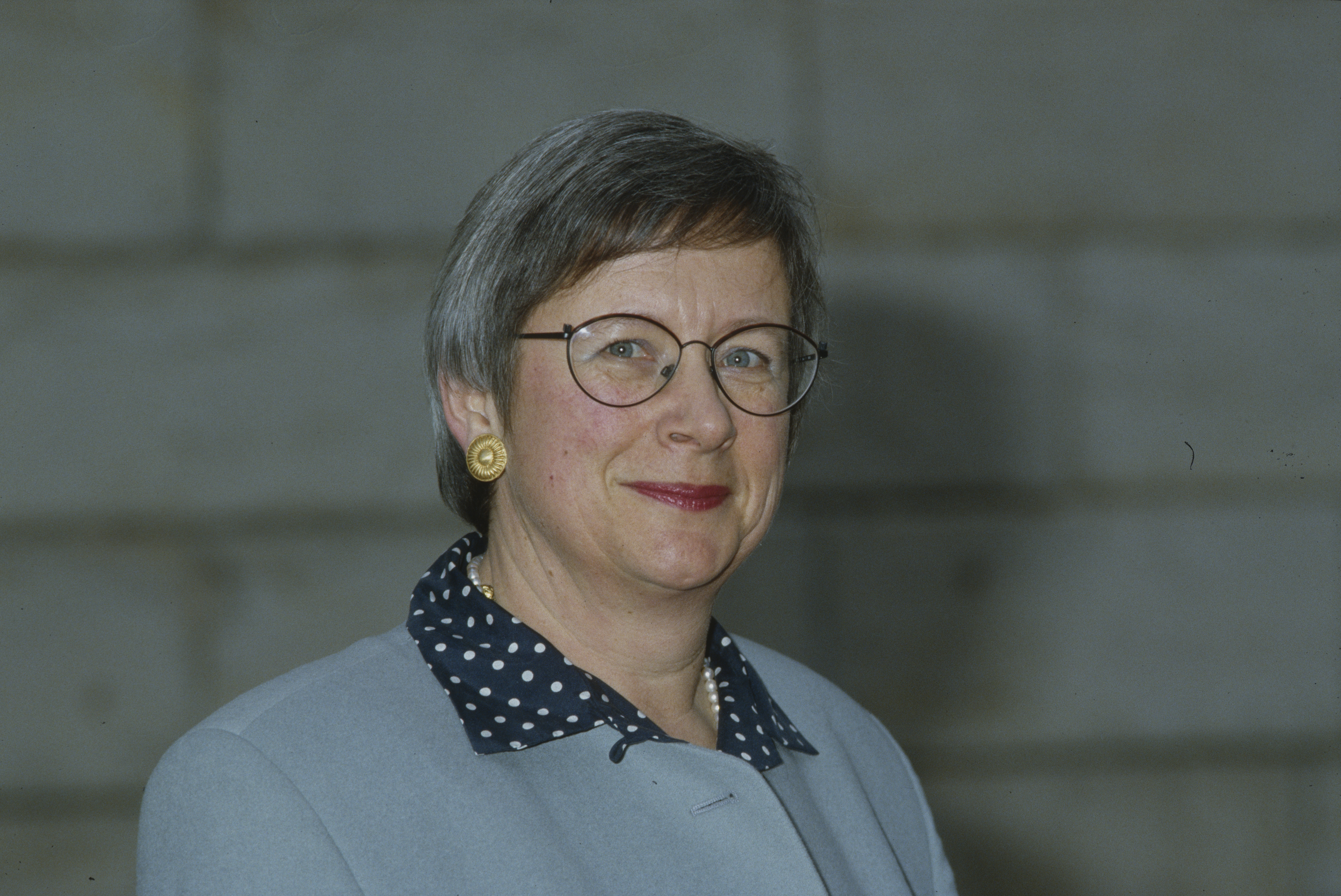 Stéphanie Mörikofer (* 1943), Aargauer Regierungsrätin 1993–2001 (FDP)